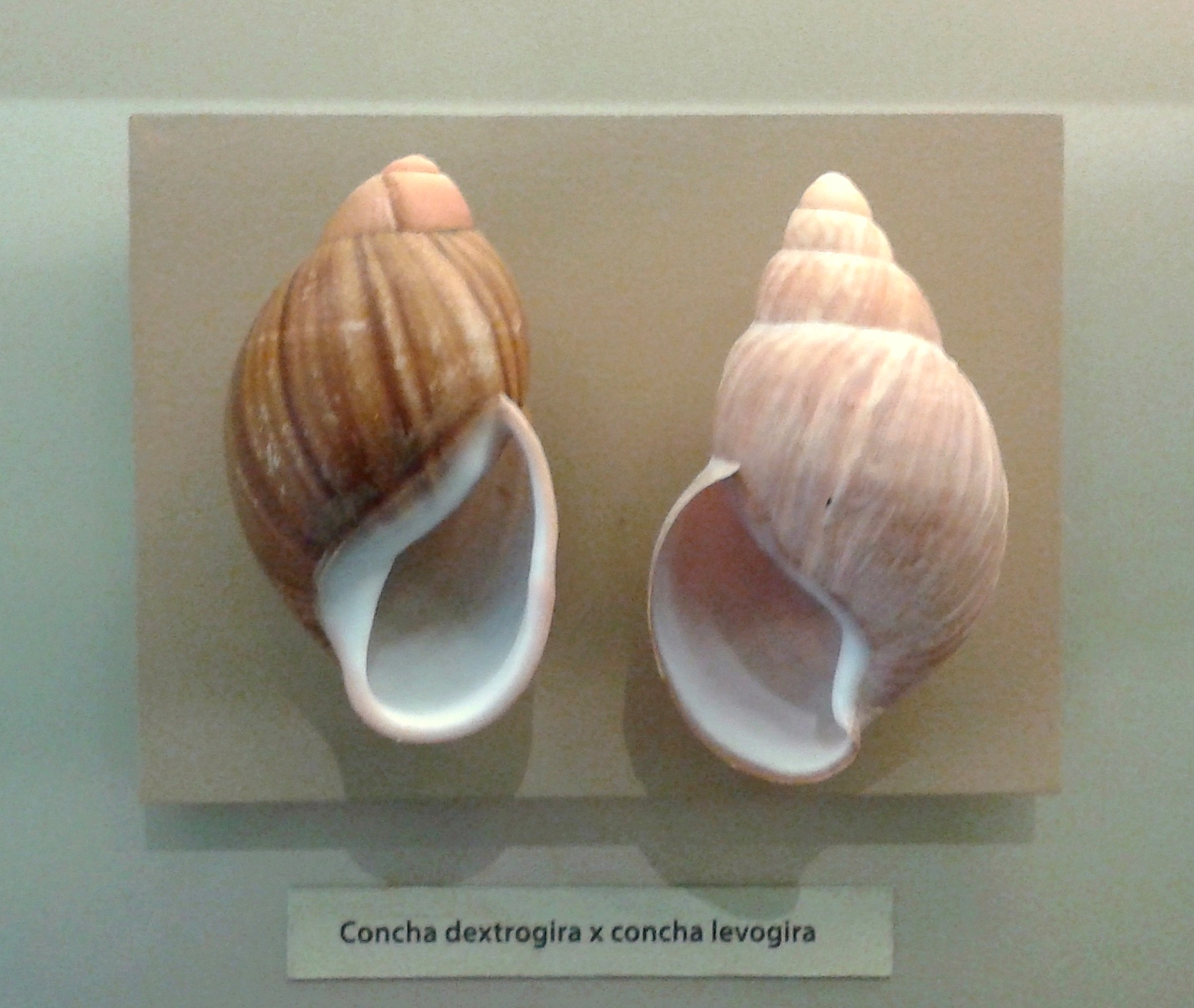 Concha dextrogira X concha levogira. Acervo de invertebrados marinhos do Museu Nacional/UFRJ - Rio de Janeiro, RJ, Brasil.